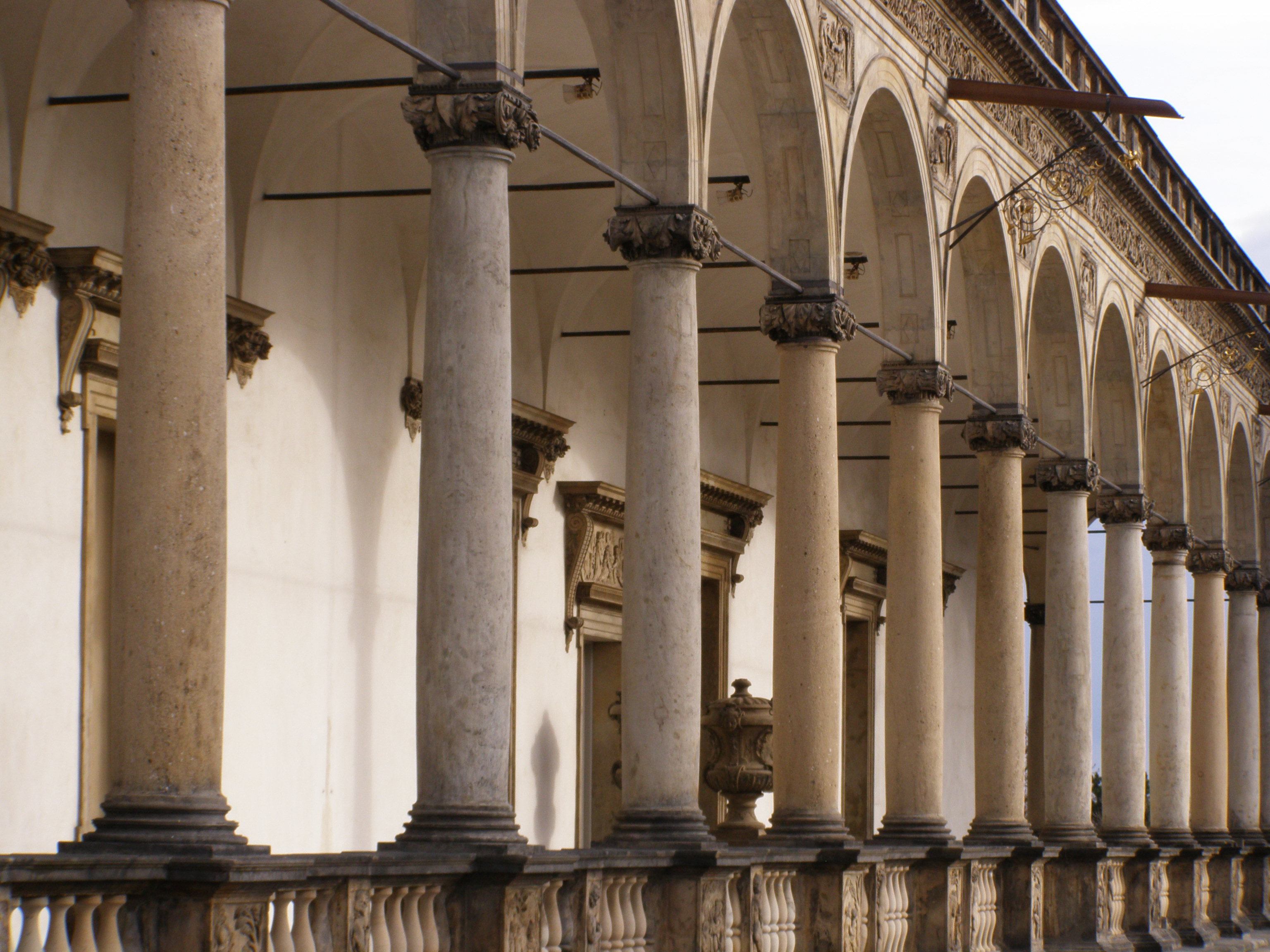 Praha, Hradčany, Pražský hrad, Letohrádek královny Anny